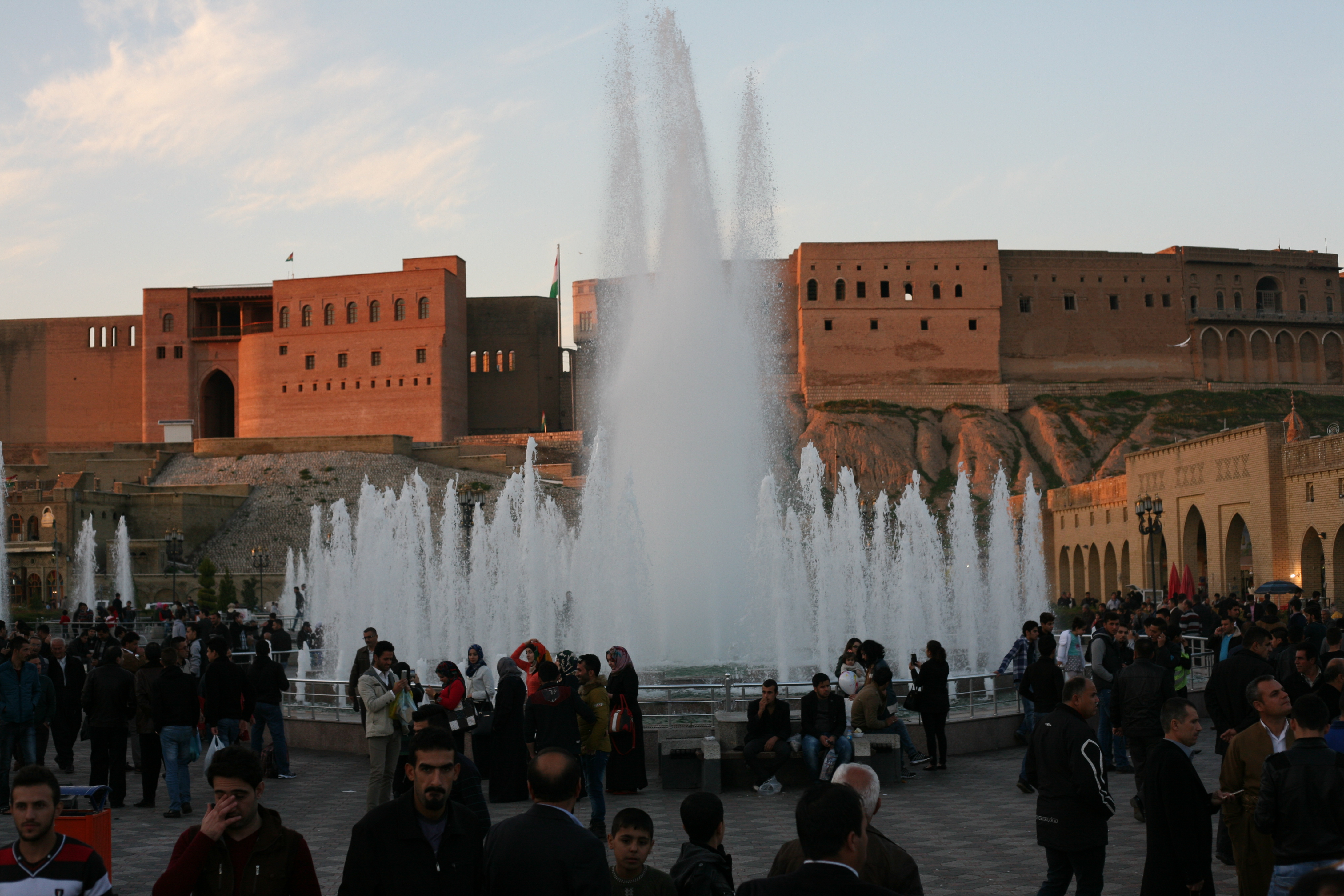 Sicht auf die Zitadelle vom zentralen Platz neben dem Markt in Arbil